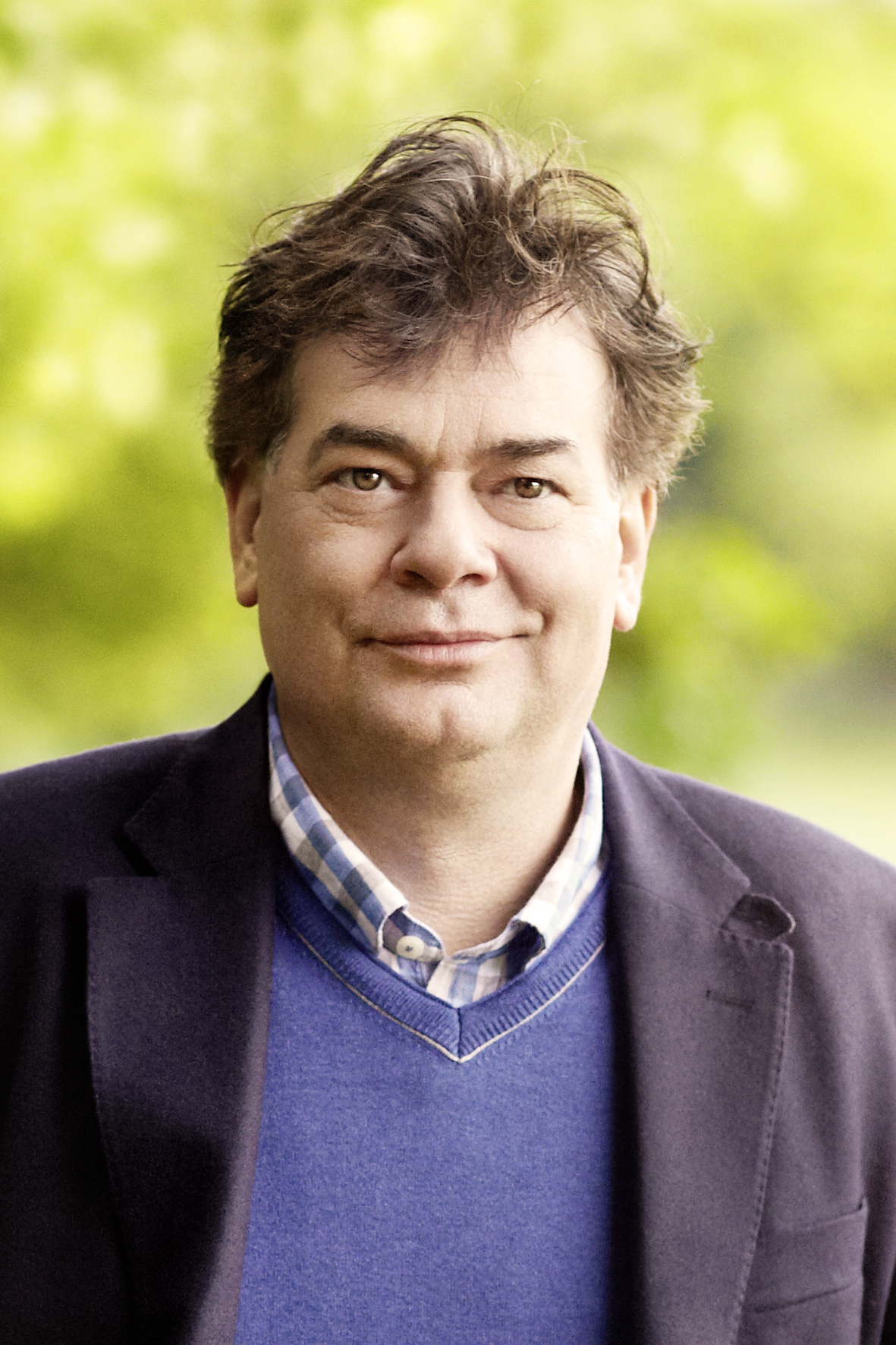 Werner Kogler als Wirtschaftssprecher, stellvertretender Klubobmann 2013